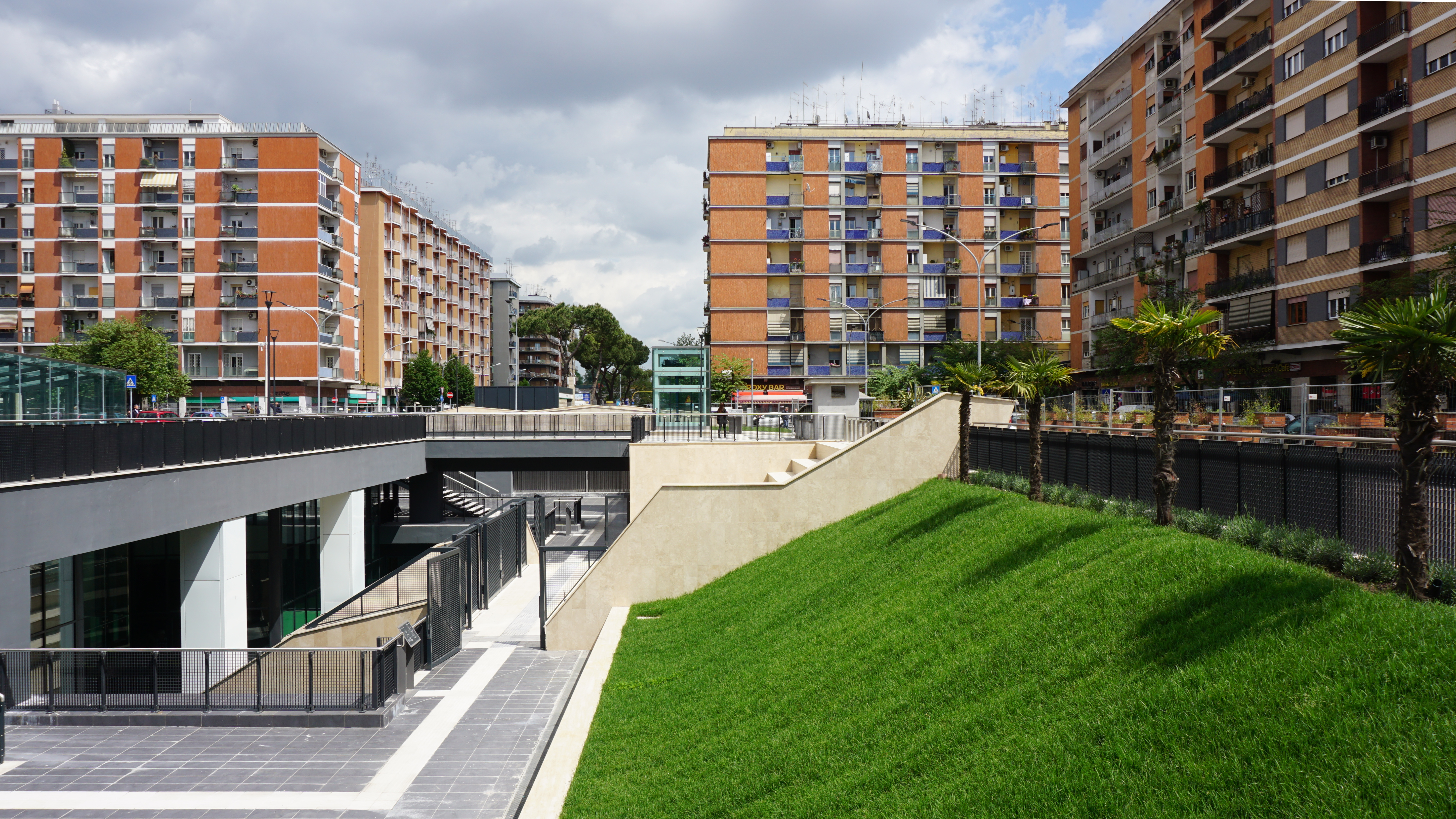 La piazza ipogea della stazione Malatesta della Metro C di Roma